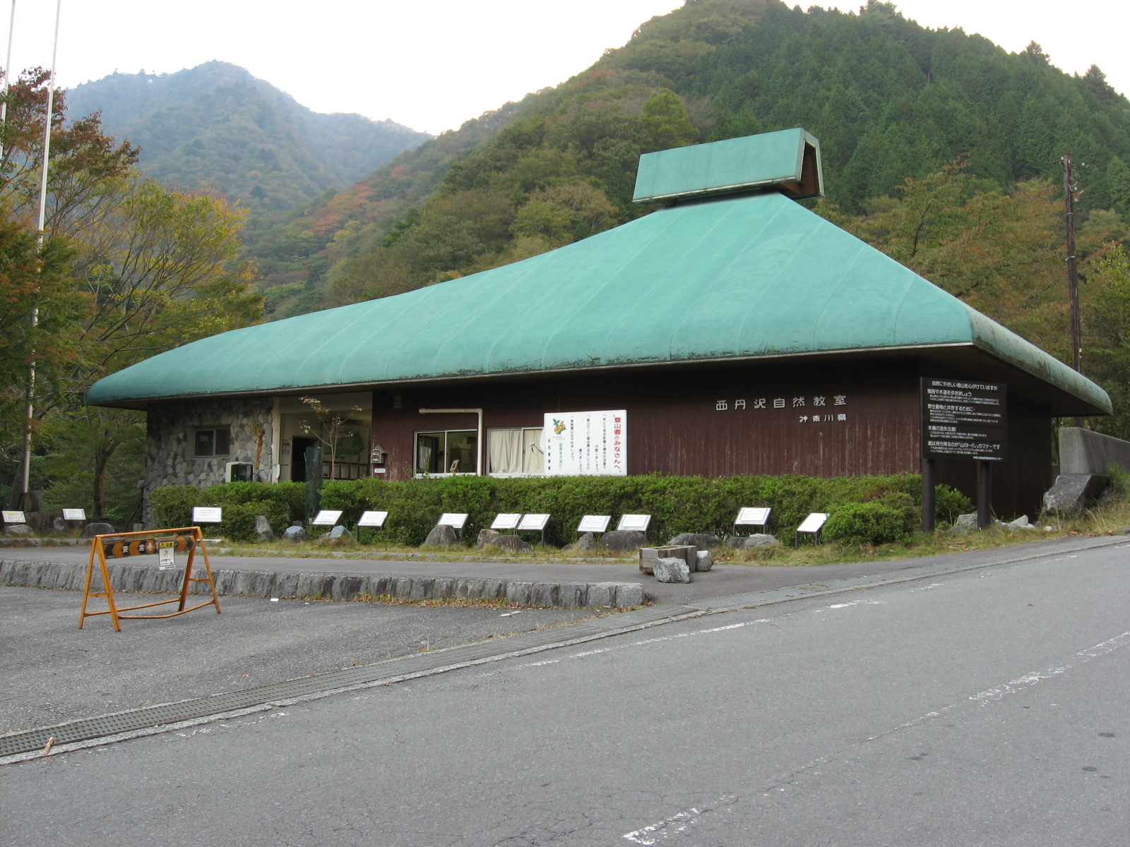 西丹沢自然教室